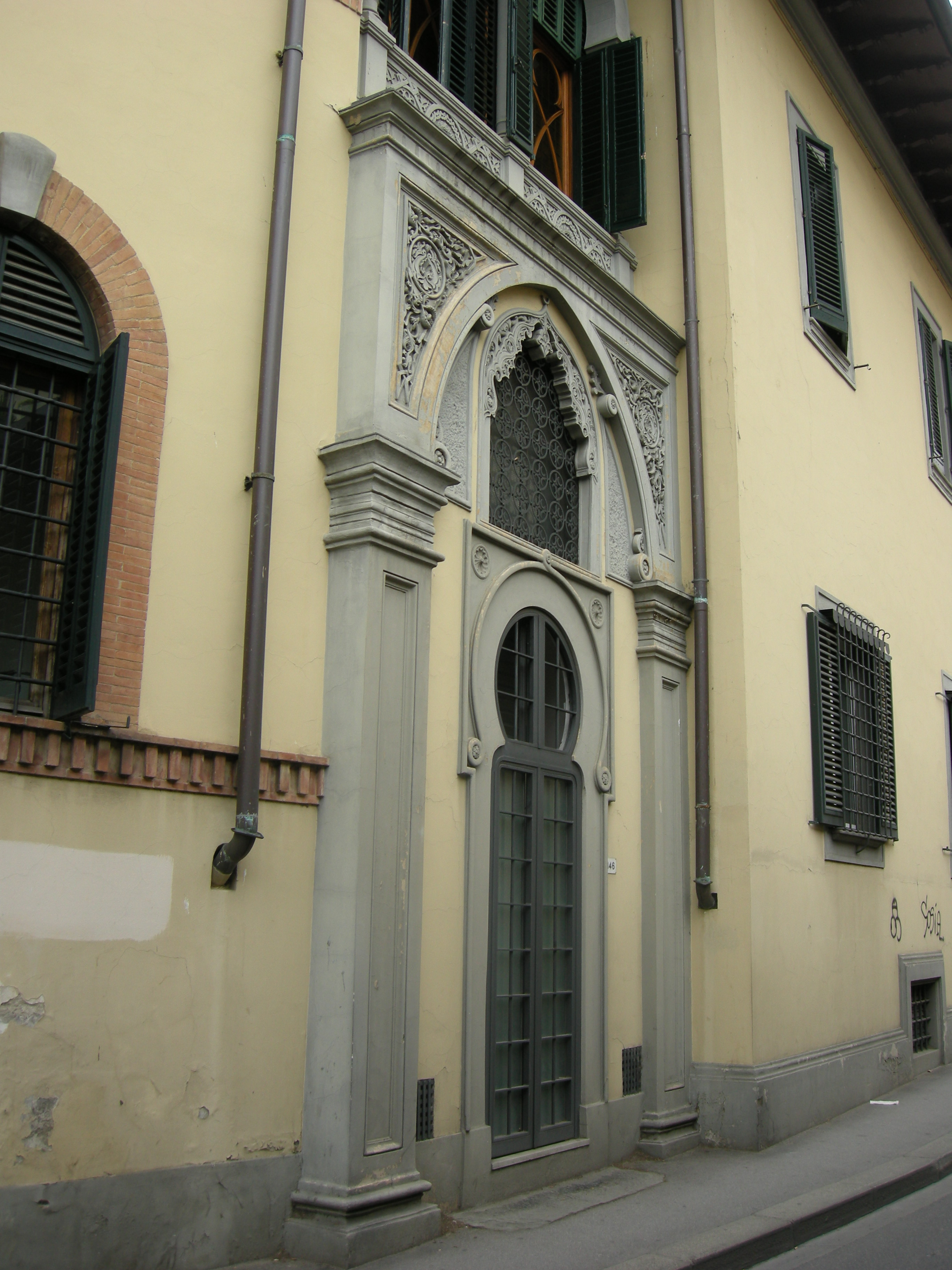 Villa gisella